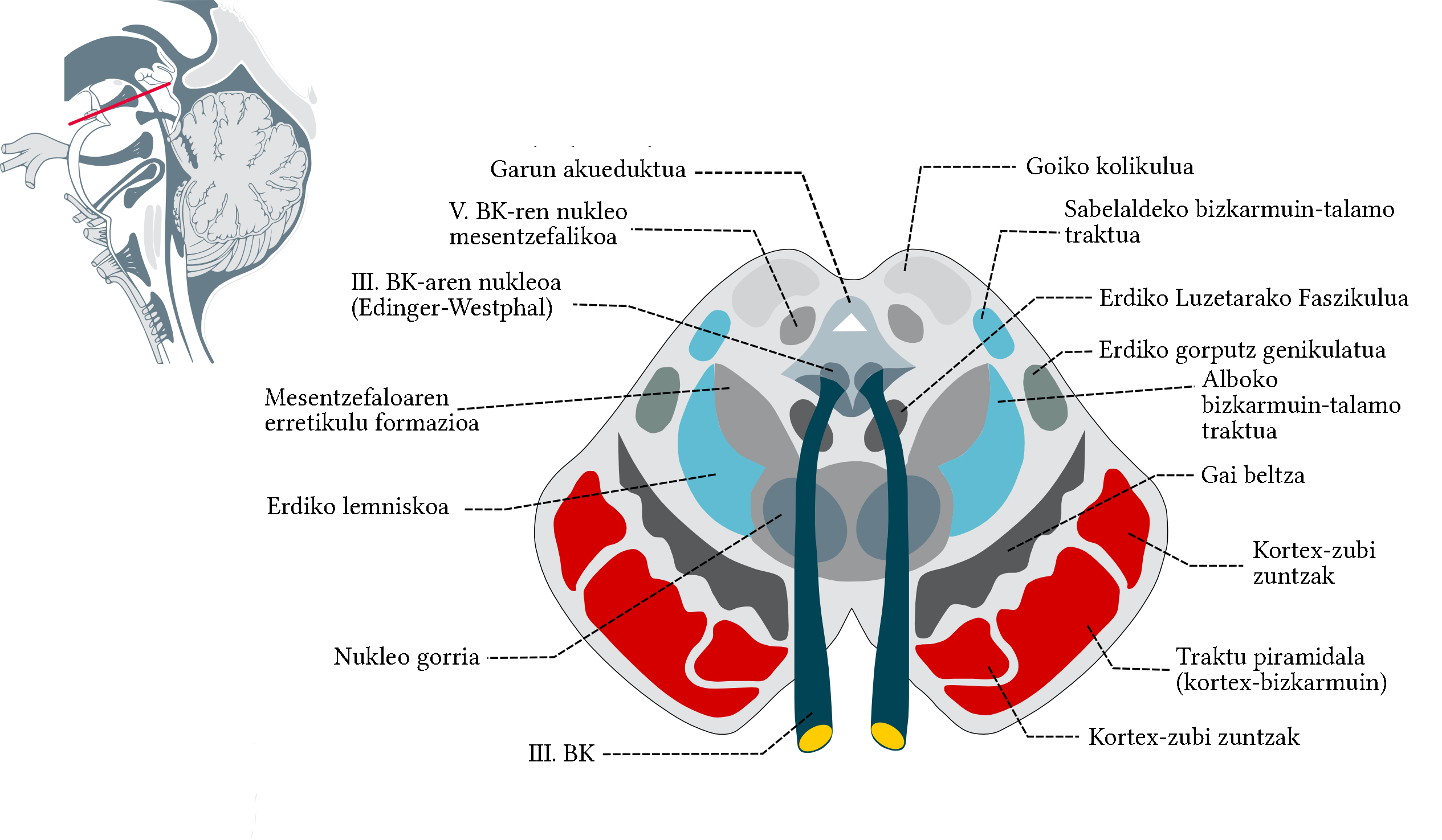 Mesentzefalo mailako entzefalo enborraren zeharkako mozketa.